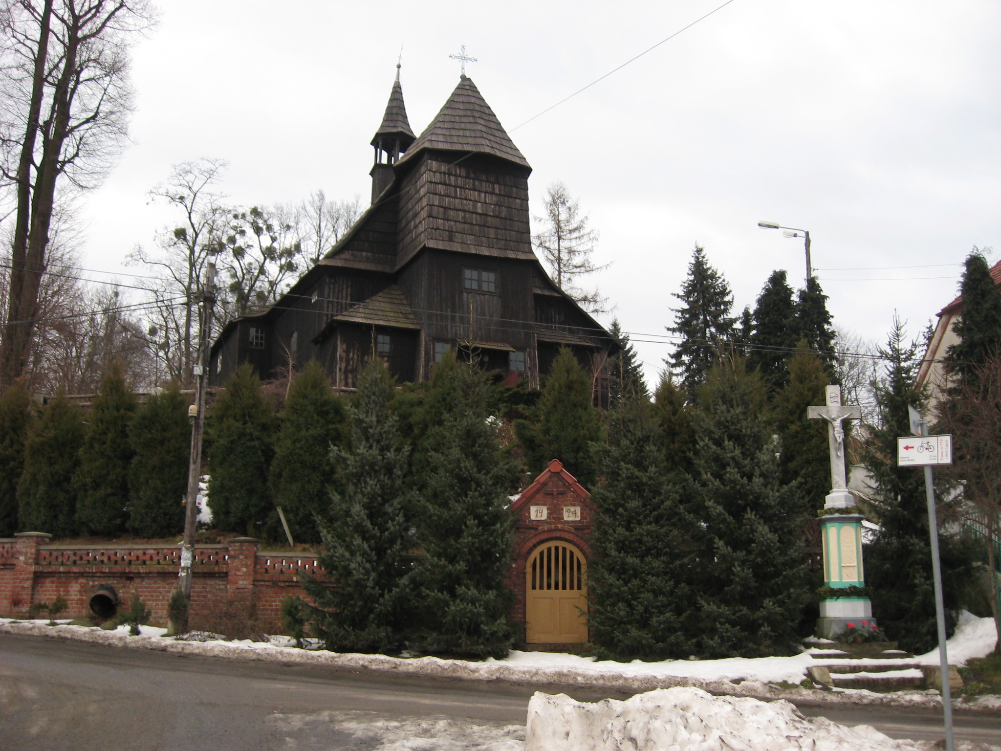 Holzkirche in Klucze (Oberschlesien)